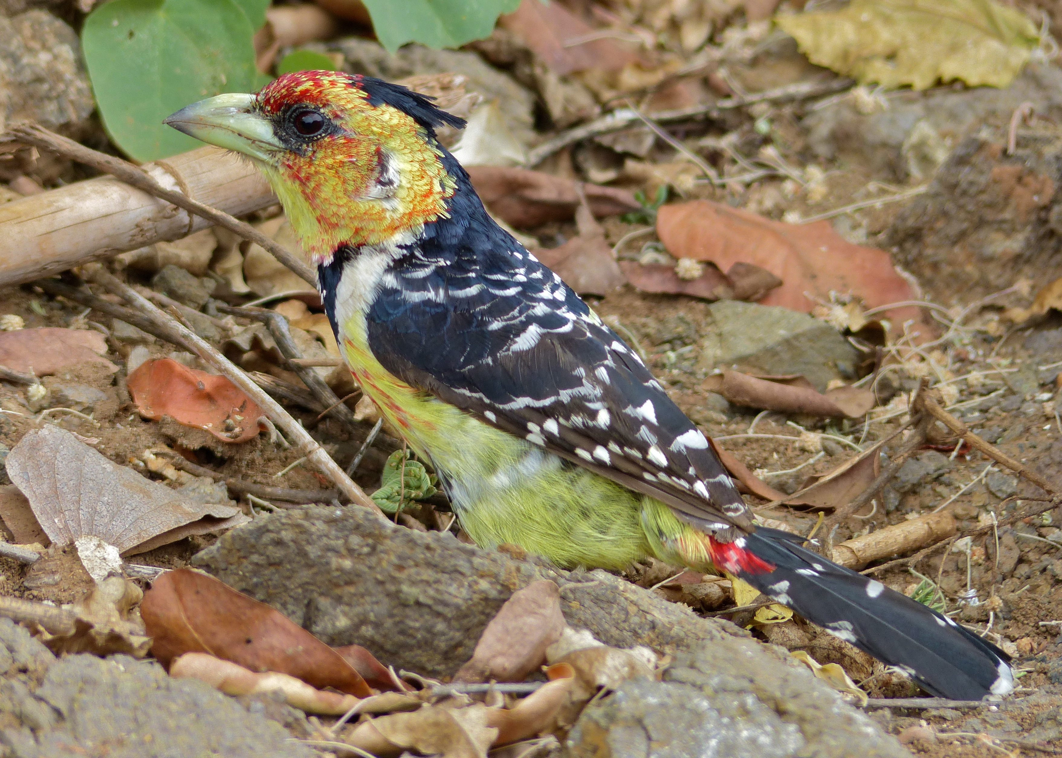 Nyala Drive, Pafuri area, Kruger NP, SOUTH AFRICA